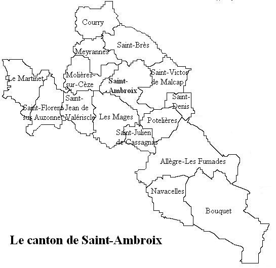 Le canton de Saint-Ambroix Image personnelle